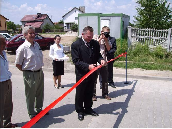 Otwarcie ulic Wodna oraz Witosa w Bierutowie przez burmistrza Grzegorza Michalaka